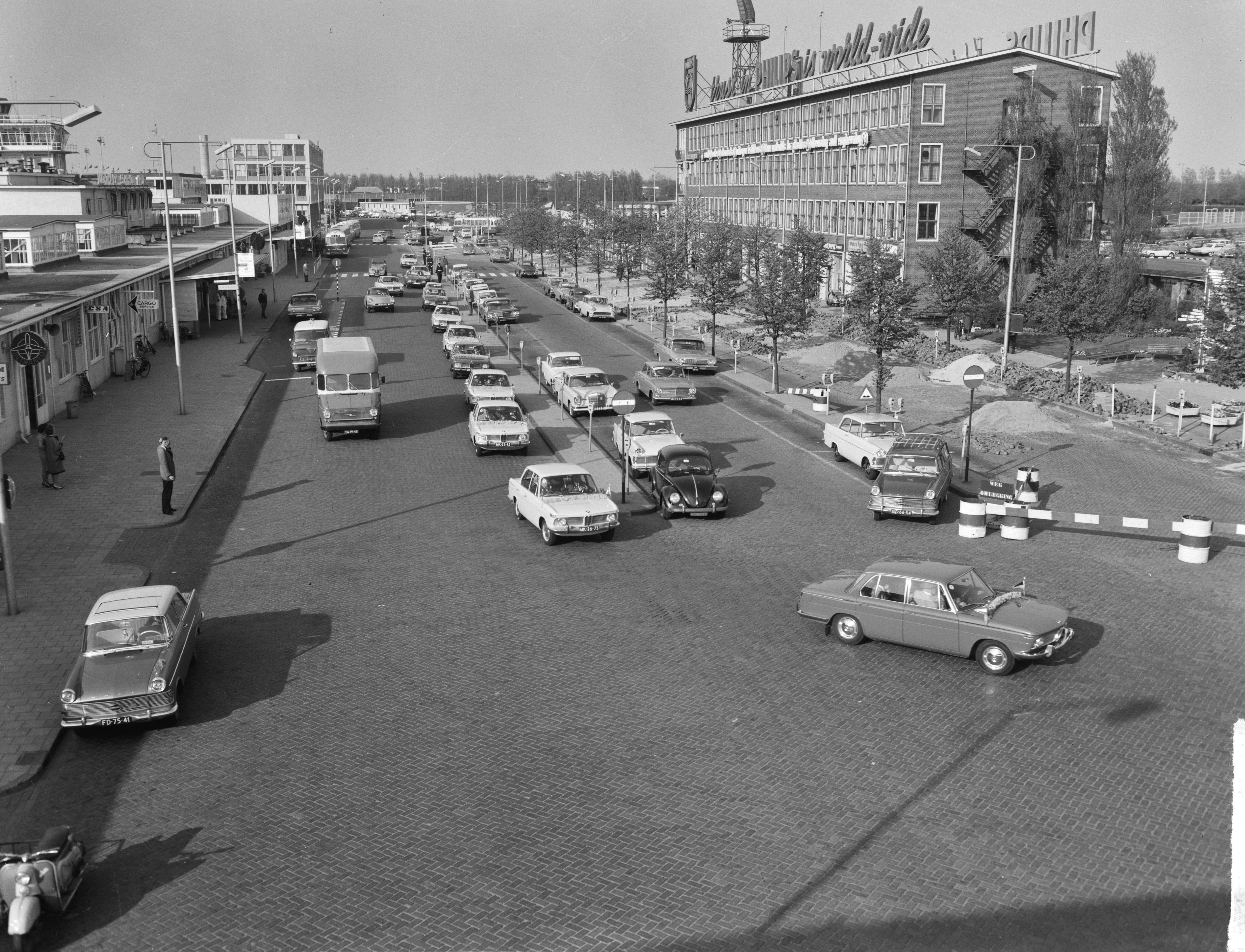 Collectie / Archief : Fotocollectie Anefo Reportage / Serie : [ onbekend ] Beschrijving : Opdracht Alimpo NV Den Haag BMW Datum : 7 mei 1963 Locatie : Den Haag, Zuid-Holland Fotograaf : Bilsen, Joop van / Anefo Auteursrechthebbende : Nationaal Archief Materiaalsoort : Negatief (zwart/wit) Nummer archiefinventaris : bekijk toegang 2.24.01.04 Bestanddeelnummer : 915-1301